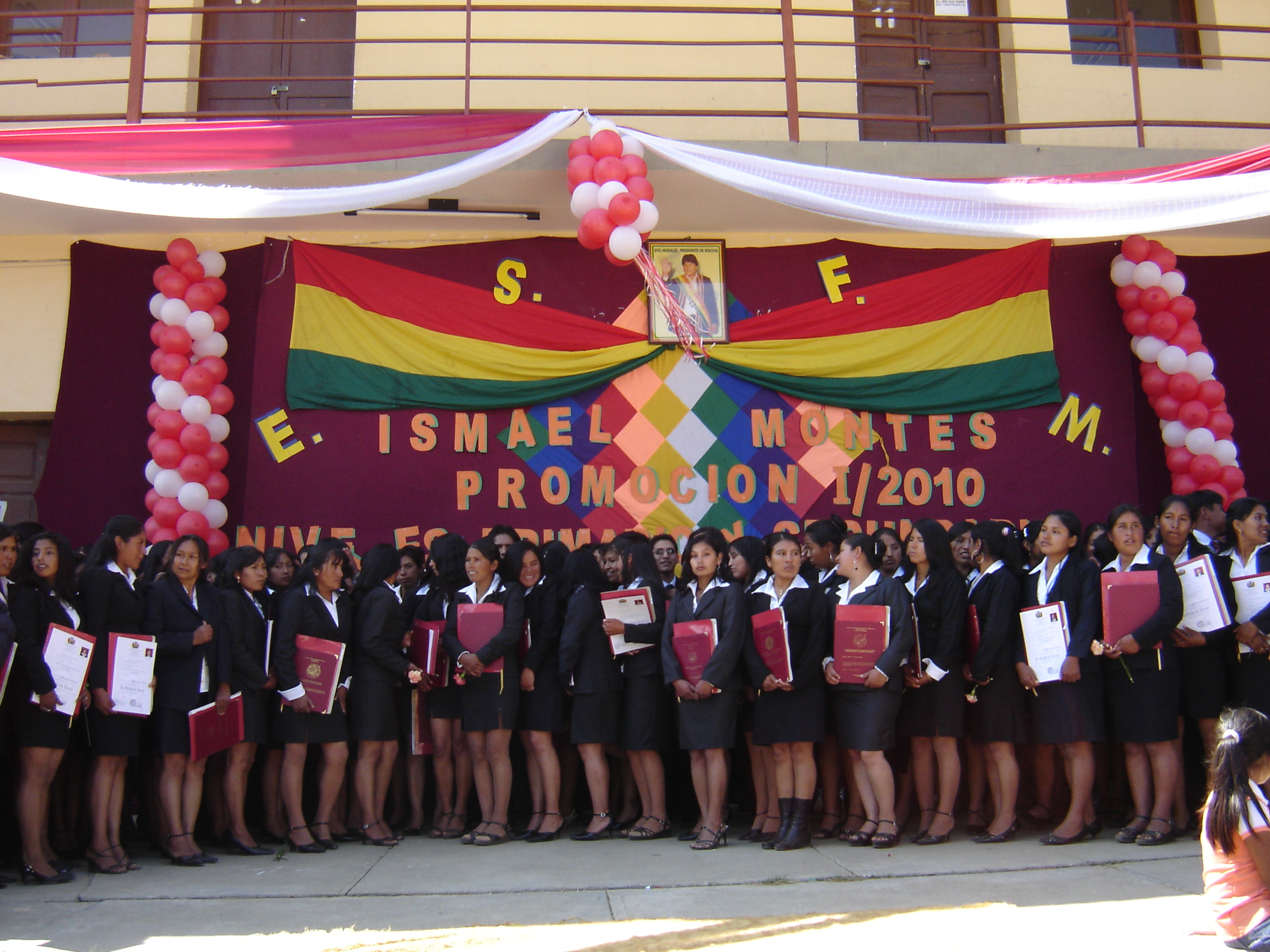 Runa Simi: Musuq yachachipkuna Wak'as Wallpama yachaywasimanta k'atmachasqakuna, 2010 watamanta ñawpaq sanaywasqa.